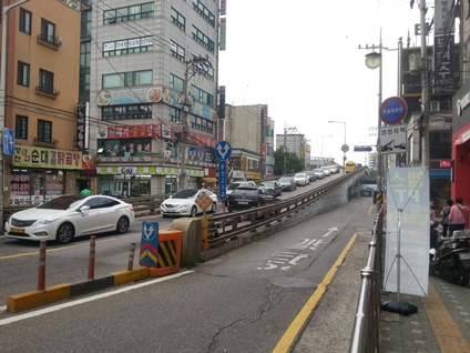 송신고가교. 경인철도를 넘어가기위해 설치된 고가도로. 수변로(水邊路)의 부속 시설물